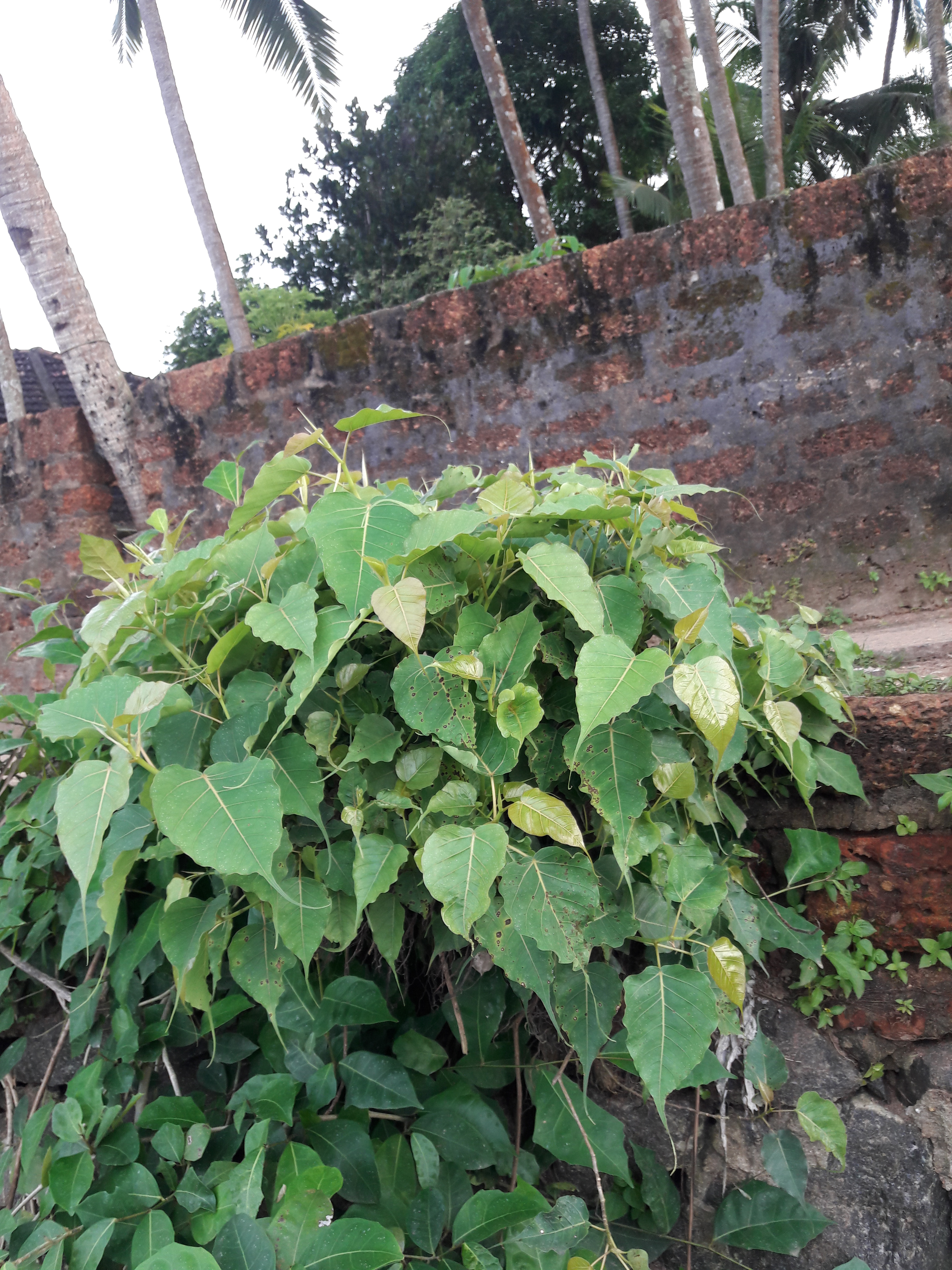 മലപ്പുറം ജില്ലയില്‍ പൊന്നാനിയില്‍ ഭാരതപ്പുഴയ്ക്ക് തീരത്തുള്ള ഒരു അരയാല്‍.Peepal tree ശാസ്ത്രീയ നാമം Ficus religiosa കുടുംബം Moraceae.